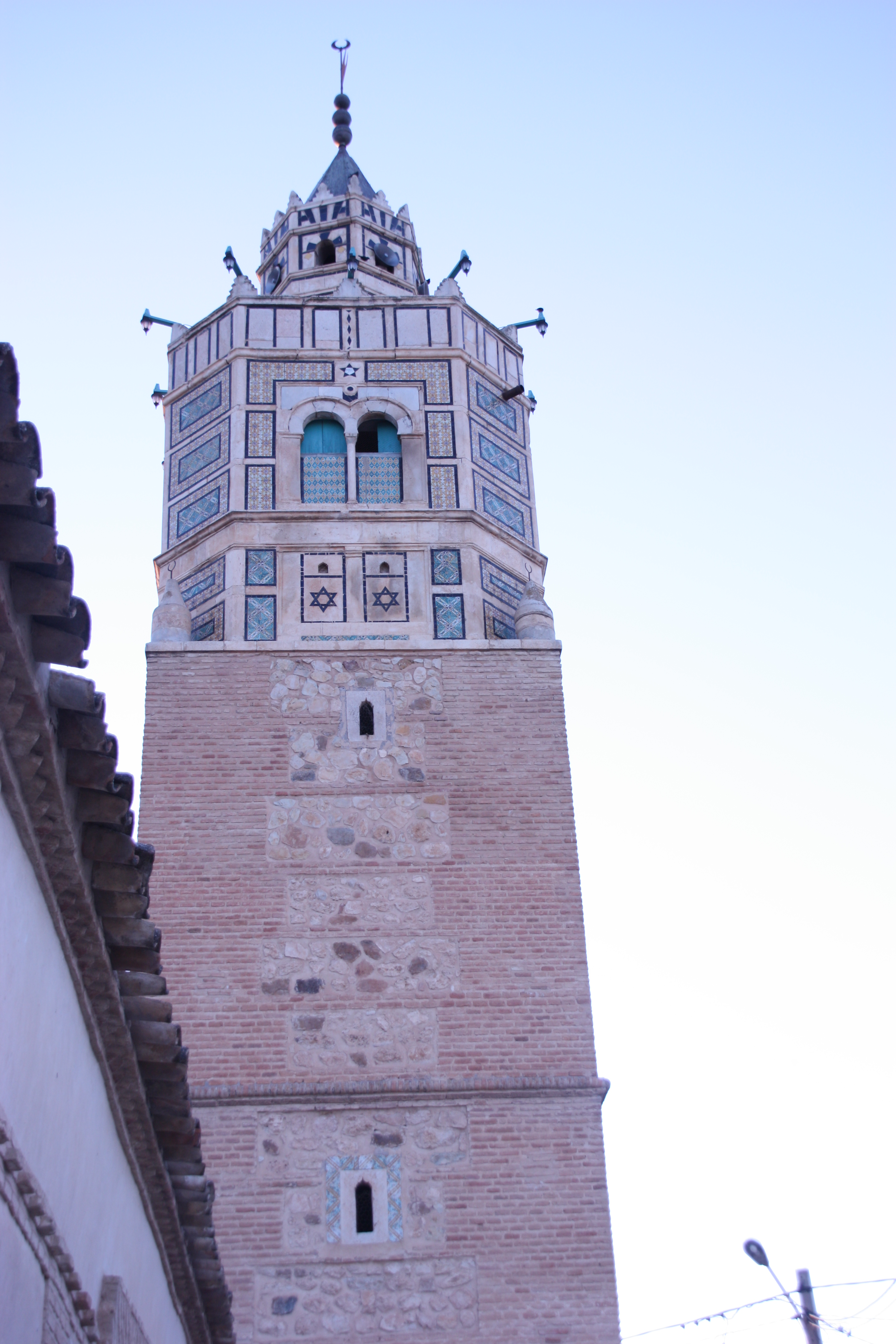 Grande mosquée, Testour